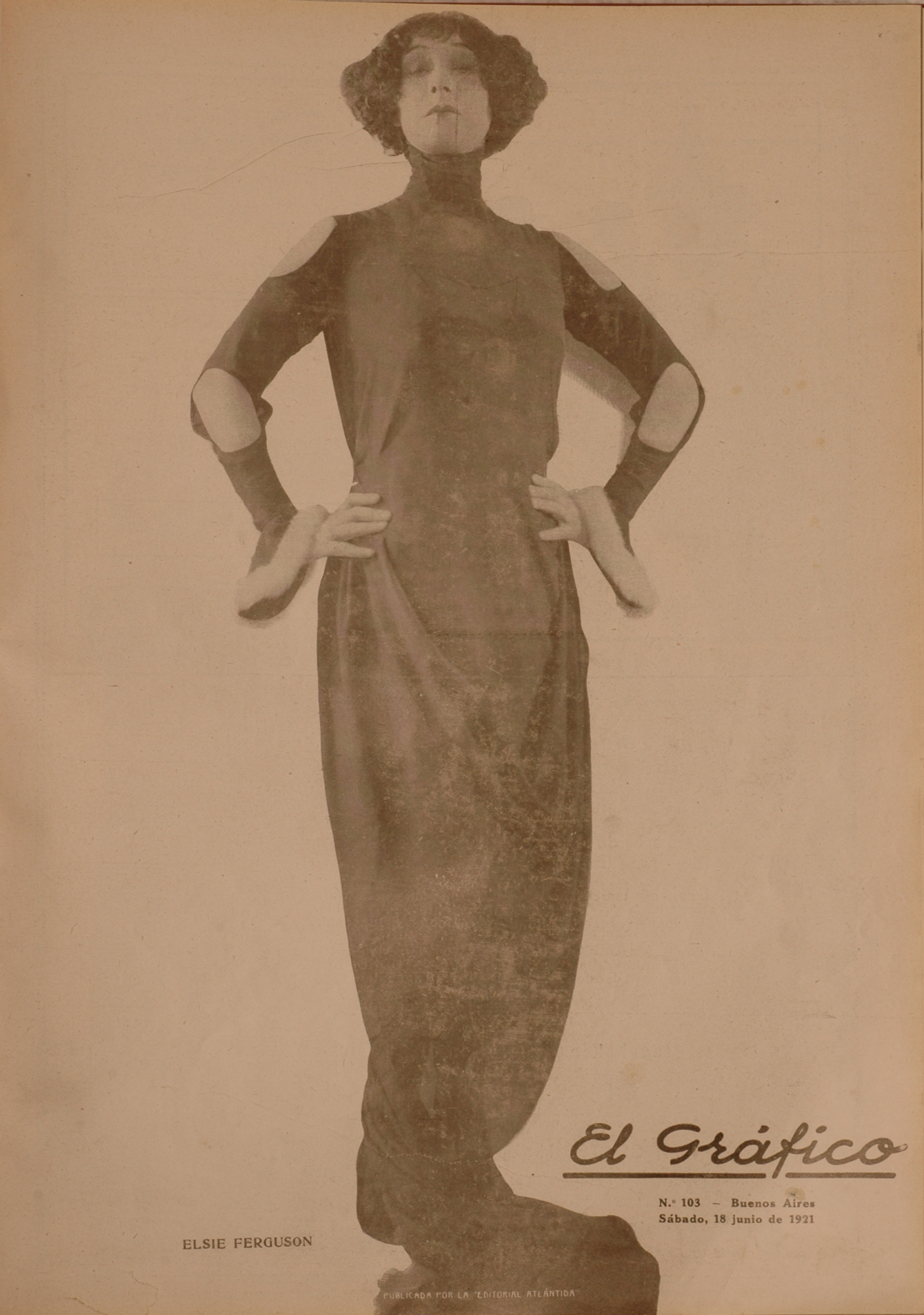 El Grafico del 18 de Junio de 1921. Edicion 103